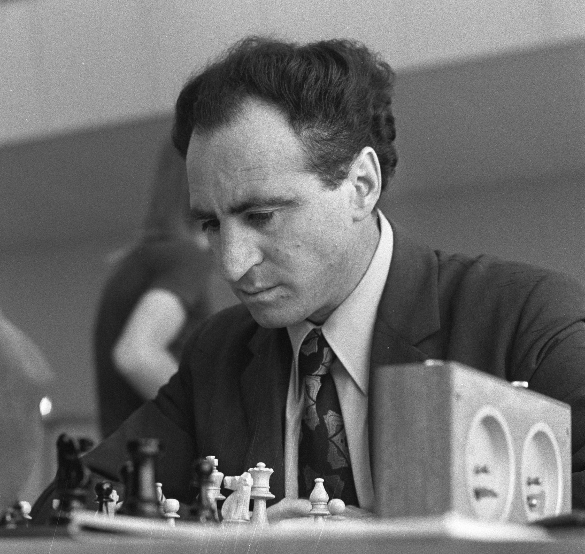 Lev Polugaevsky